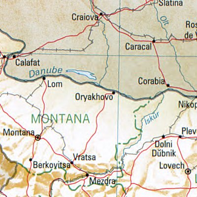 Orjachowo - Lage des Ortes in Bulgarien